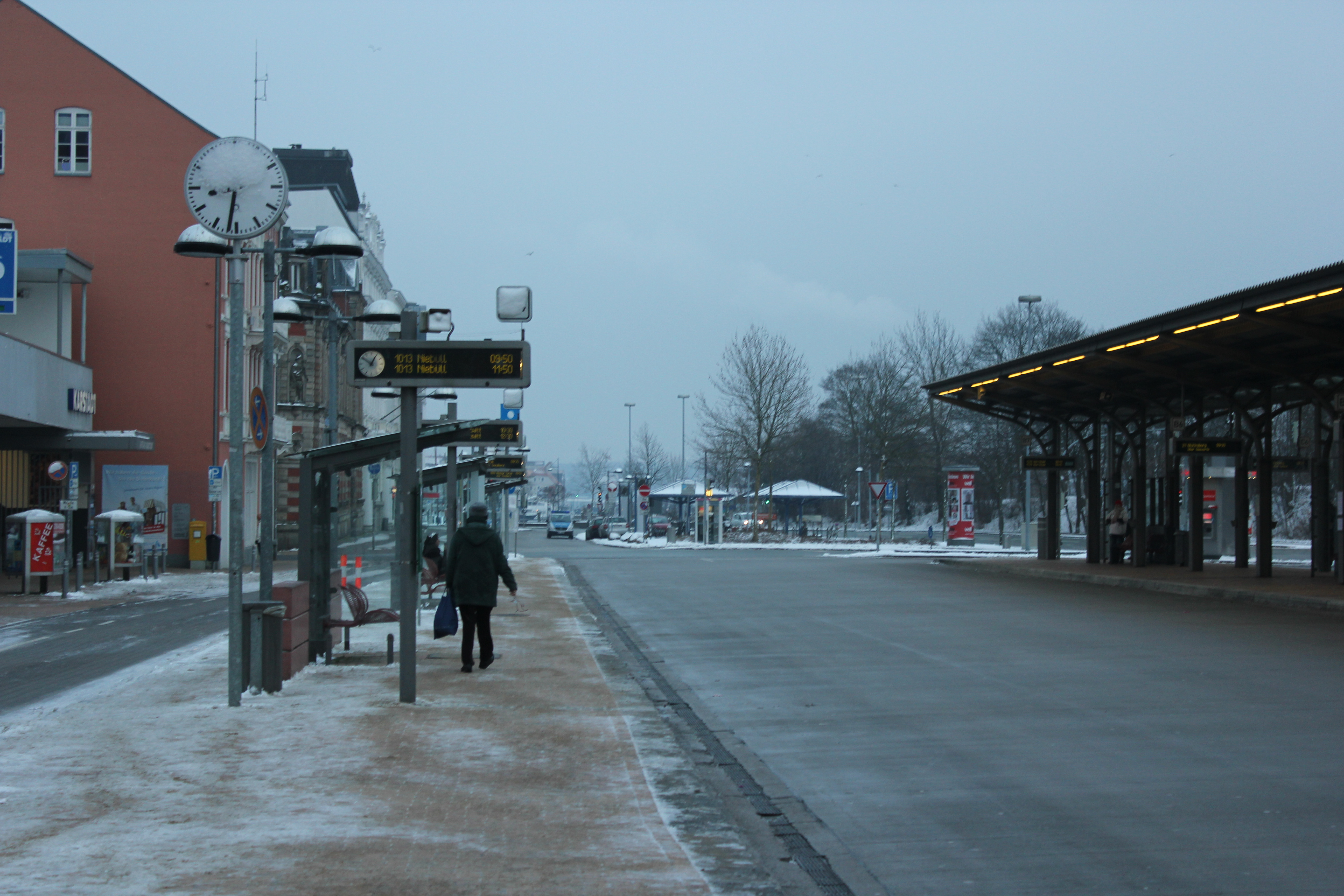 ZOB Flensburg im Schnee 2012; links ist noch Karstadt im alten Zustand zu sehen mit zwei Schaukästen die an verschiedene Firmen, beispielsweise dem Kiosk vom ZOB meine ich, vermietet wurden